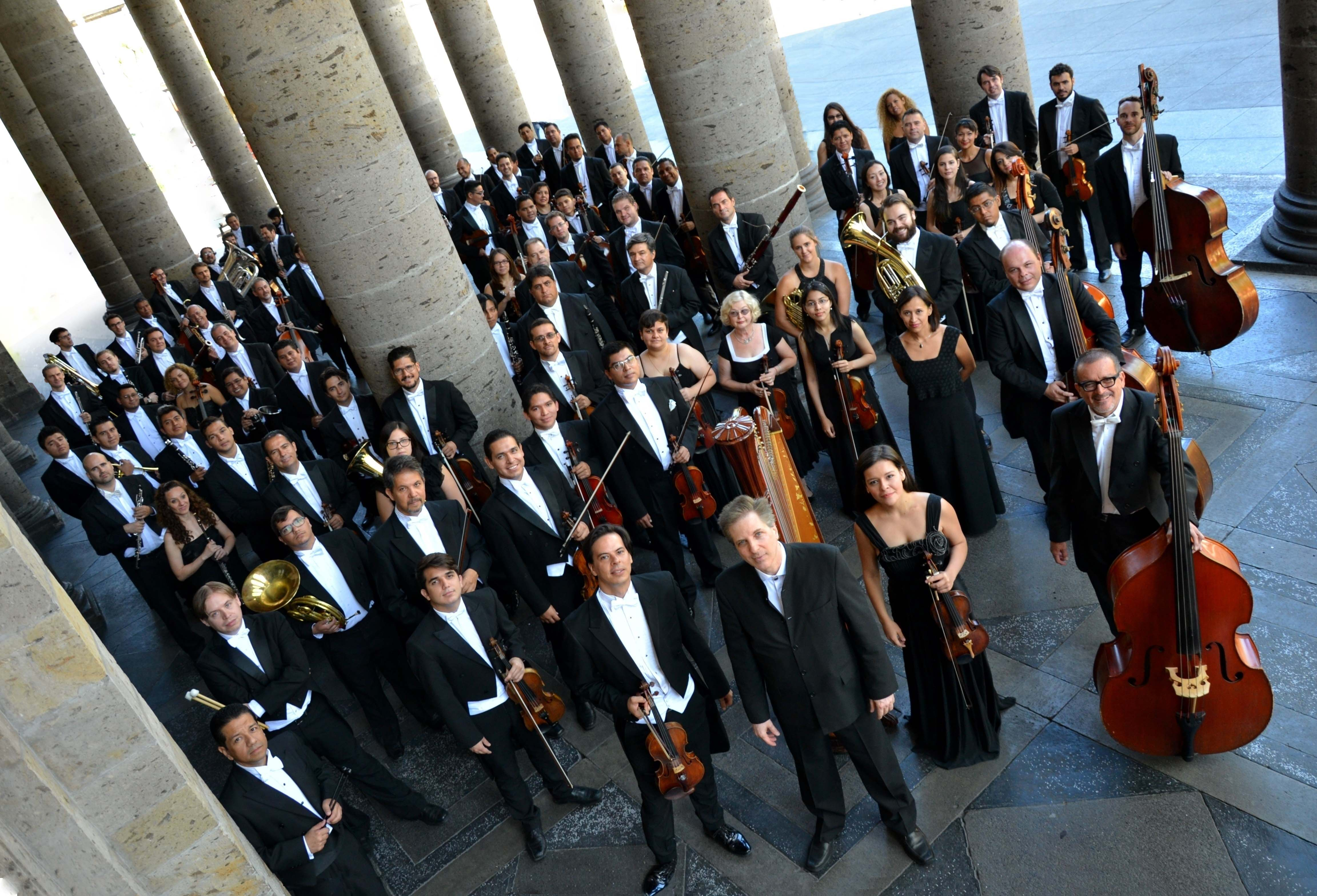 La Orquesta Filarmónica de Jalisco en su sede el Teatro Degollado de Guadalajara, Jalisco, México. Fotografía por: Marco Ayala